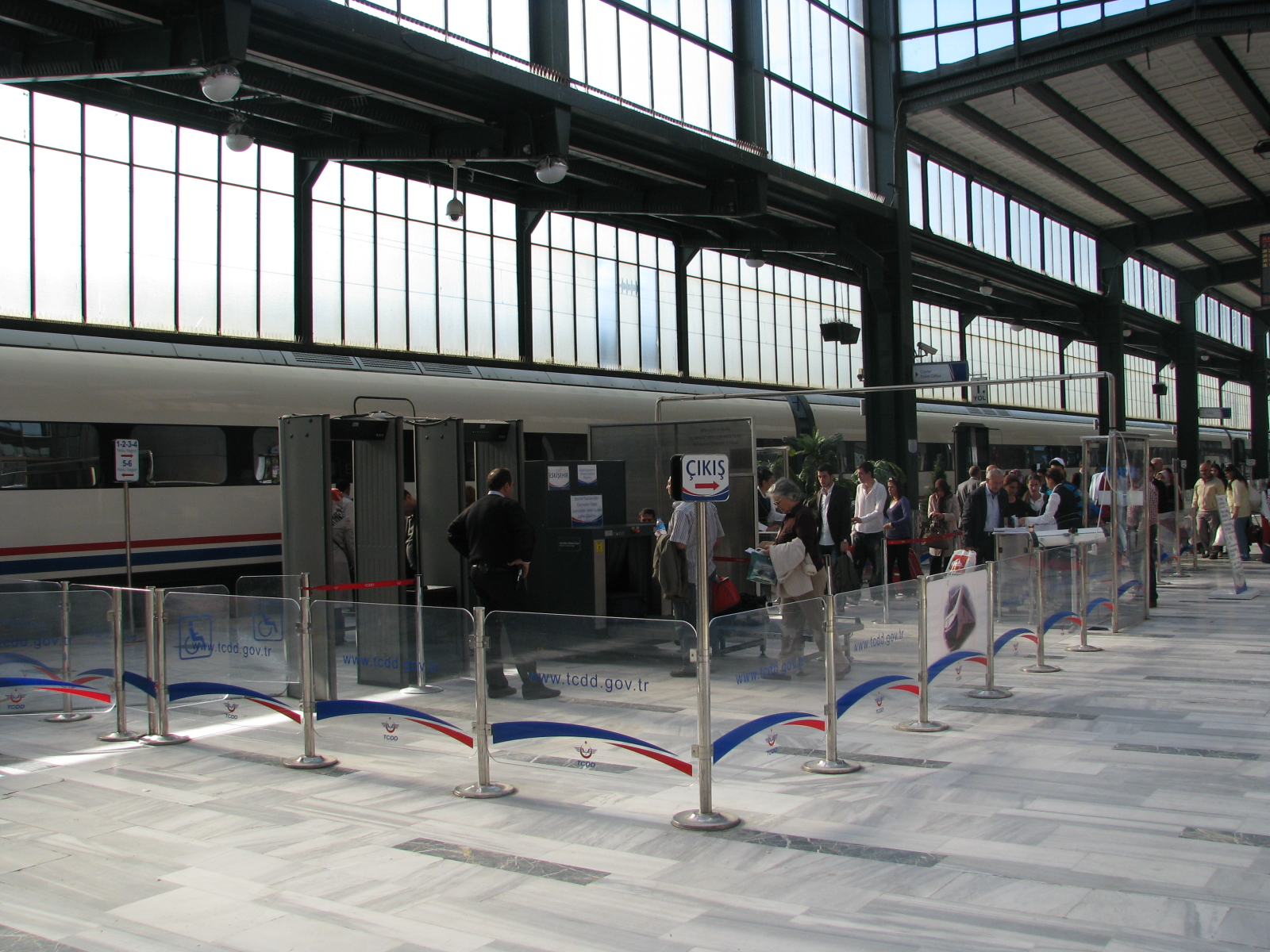 Ankara Central Station, YHT Train